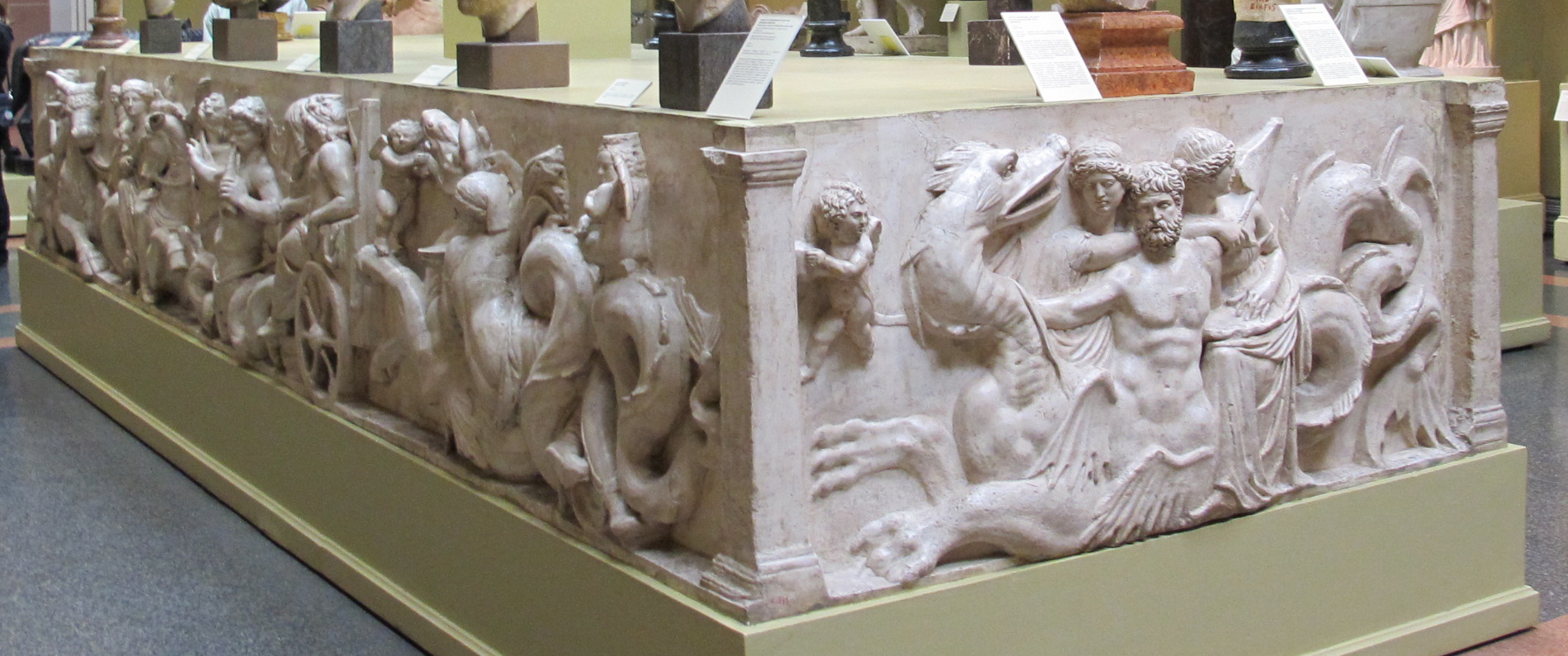 Museo pushkin, calchi, ara di domizio enobarbo